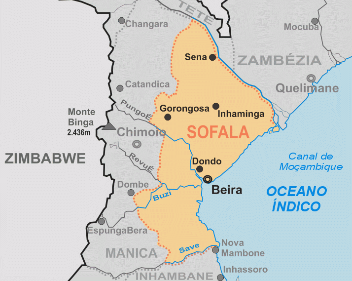 Mapa da Província de Sofala, em Moçambique - feita para a Wikipédia por André Koehne